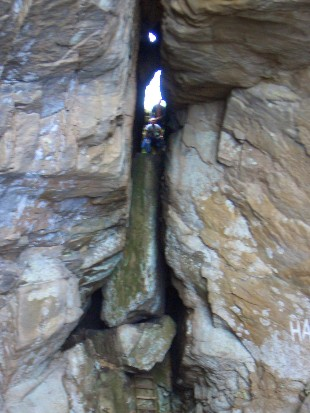 Bolgbørra - hull gjennom fjellet på Bolga i Nordland